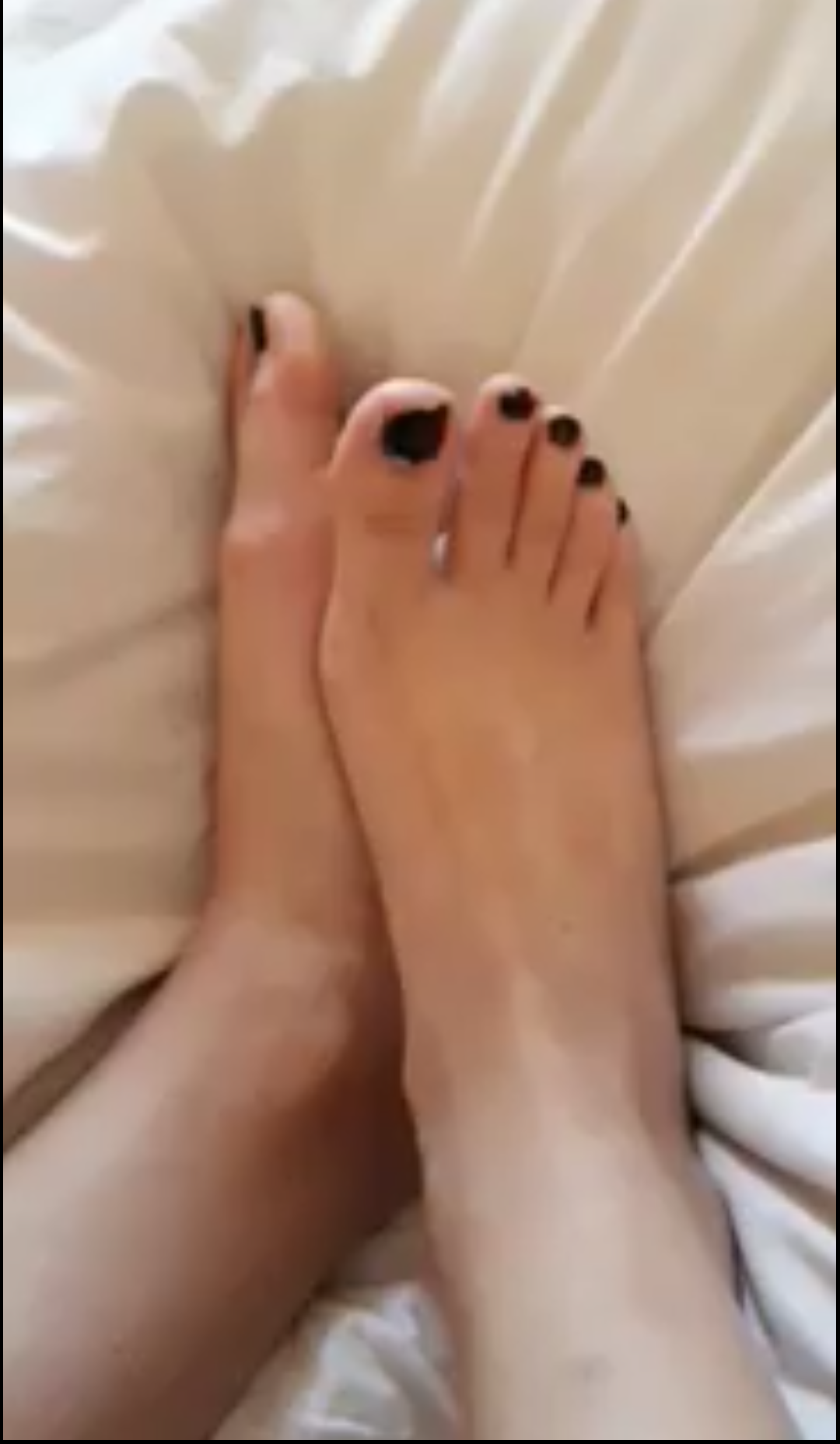 Partea terminala a membrului inferior la oameni